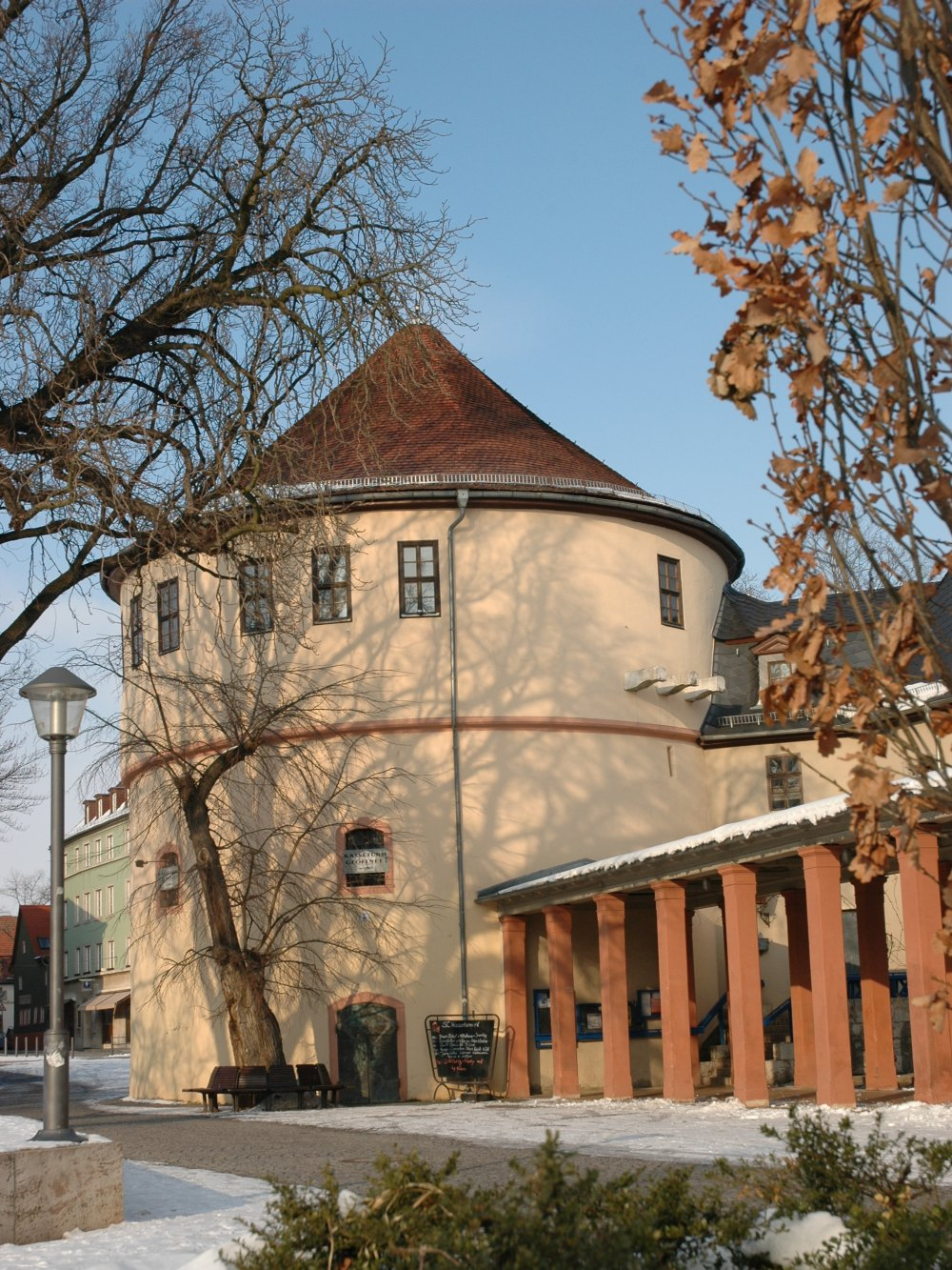 Kasseturm Weimar März 2005